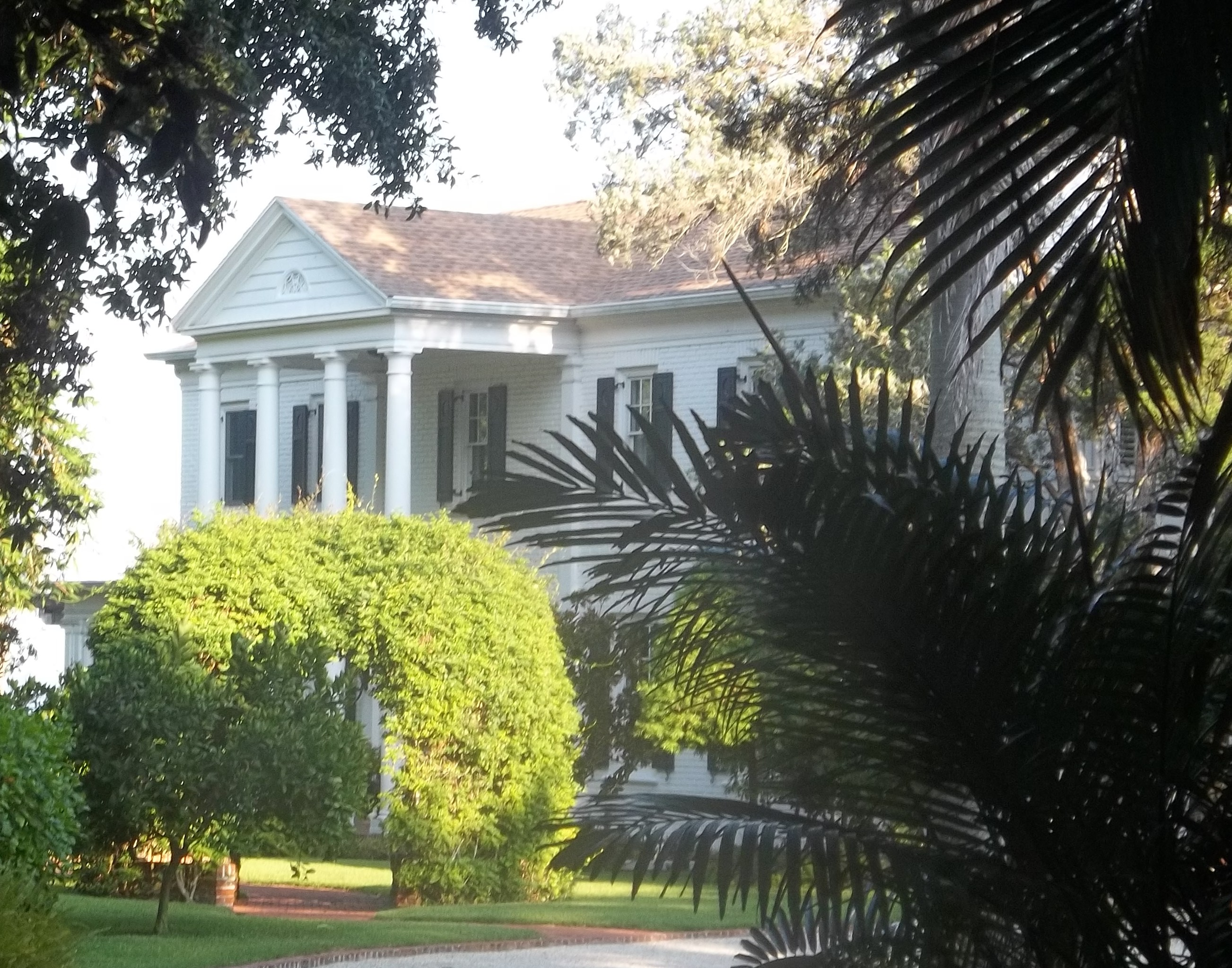 Sarasota, Florida: Earle House (Sarasota, Florida)